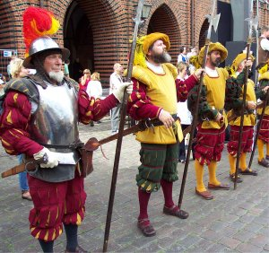 Stralsund - Stadtpanorama vom Meer aus fotografiert von harald909 Mitte Mai 2004 GNU-FDL